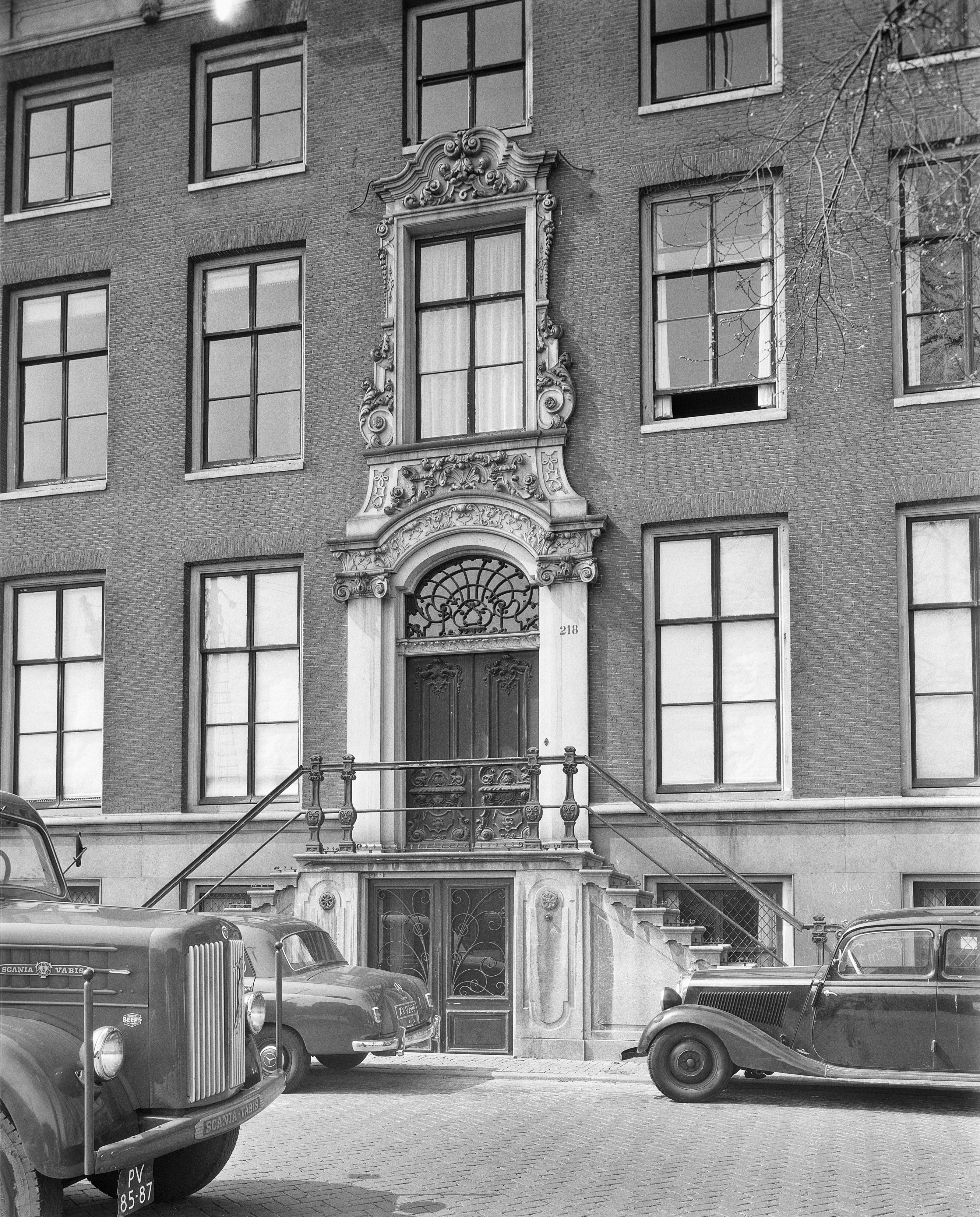 middenpartij